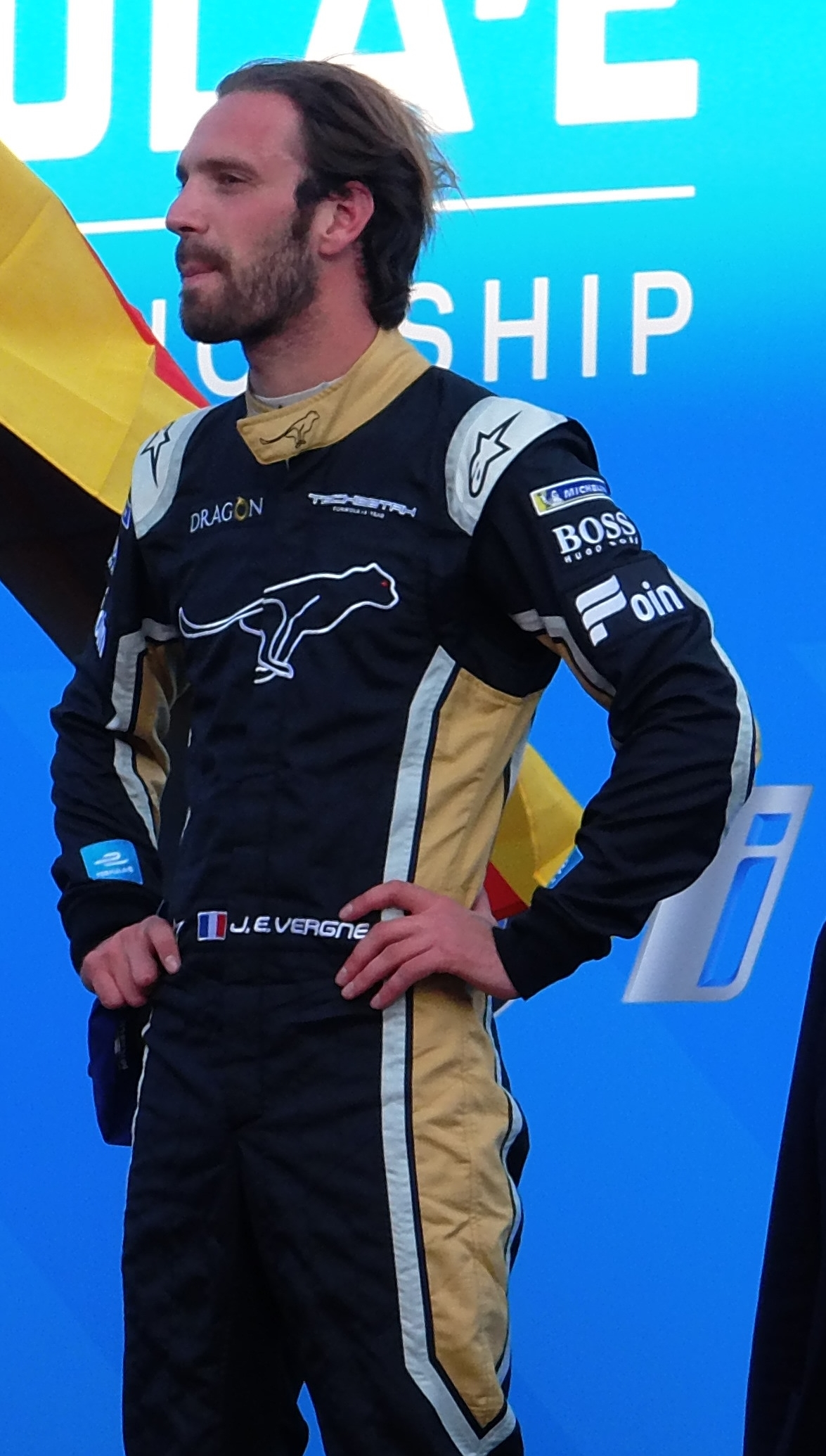 Podium zum Berlin E-Prix 2018: Dieter Gass, Lucas di Grassi, Daniel Abt und Jean-Éric Vergne (v.l.n.r.)